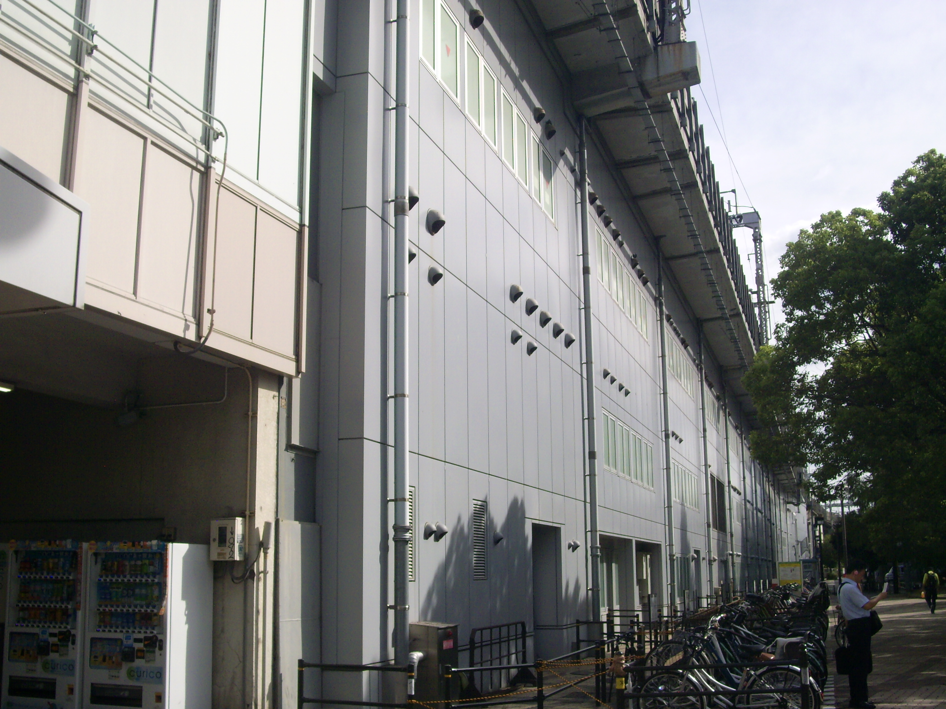 東海道新幹線大阪第一・第二運輸所および大阪保線所・大阪新幹線構造物検査センター・大阪電力所・大阪信号通信所・JR東海関西労組等が入居する新大阪駅東京方高架下 ㊟カメラを起動すると日付機能が出荷時のものに初期化されるため、ファイル履歴の投稿日時とメタデータの原画像データの生成日時が異なります（本概要欄の下記日付が撮影日）